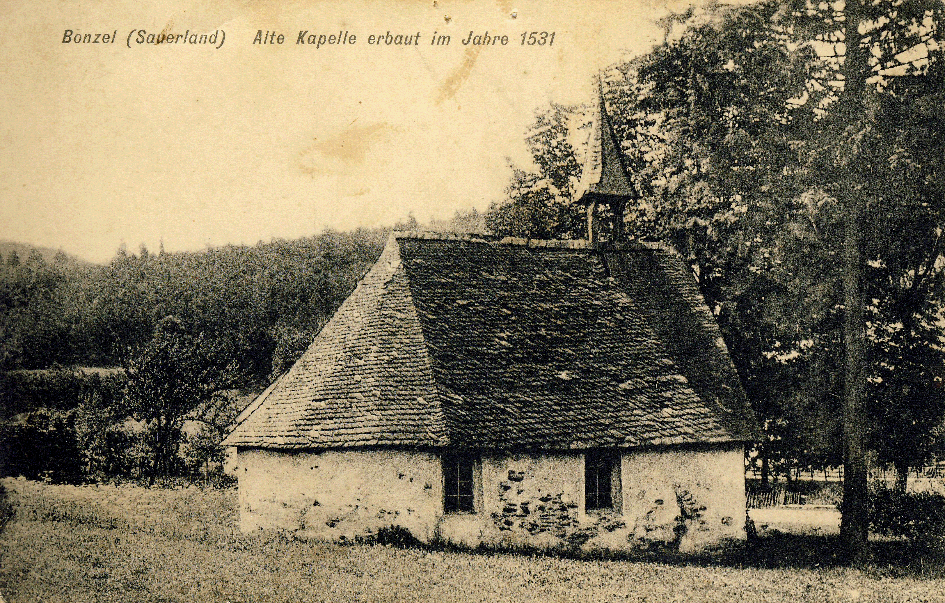 Die Kapelle wurde 1924 abgerissen.